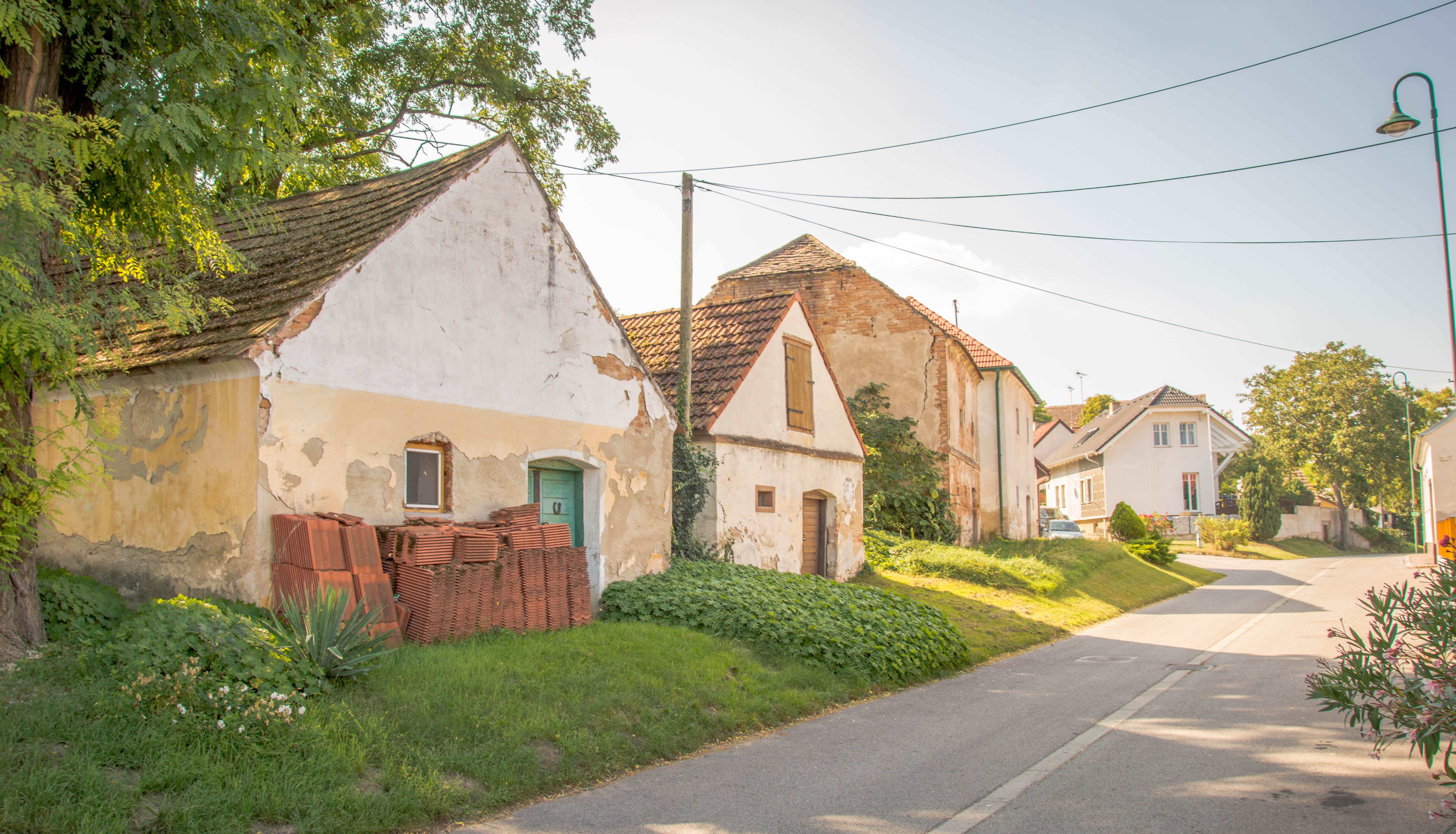 Kellergasse „Beim Meierhof“ in der KG Ringelsdorf in Ringelsdorf-Niederabsdorf